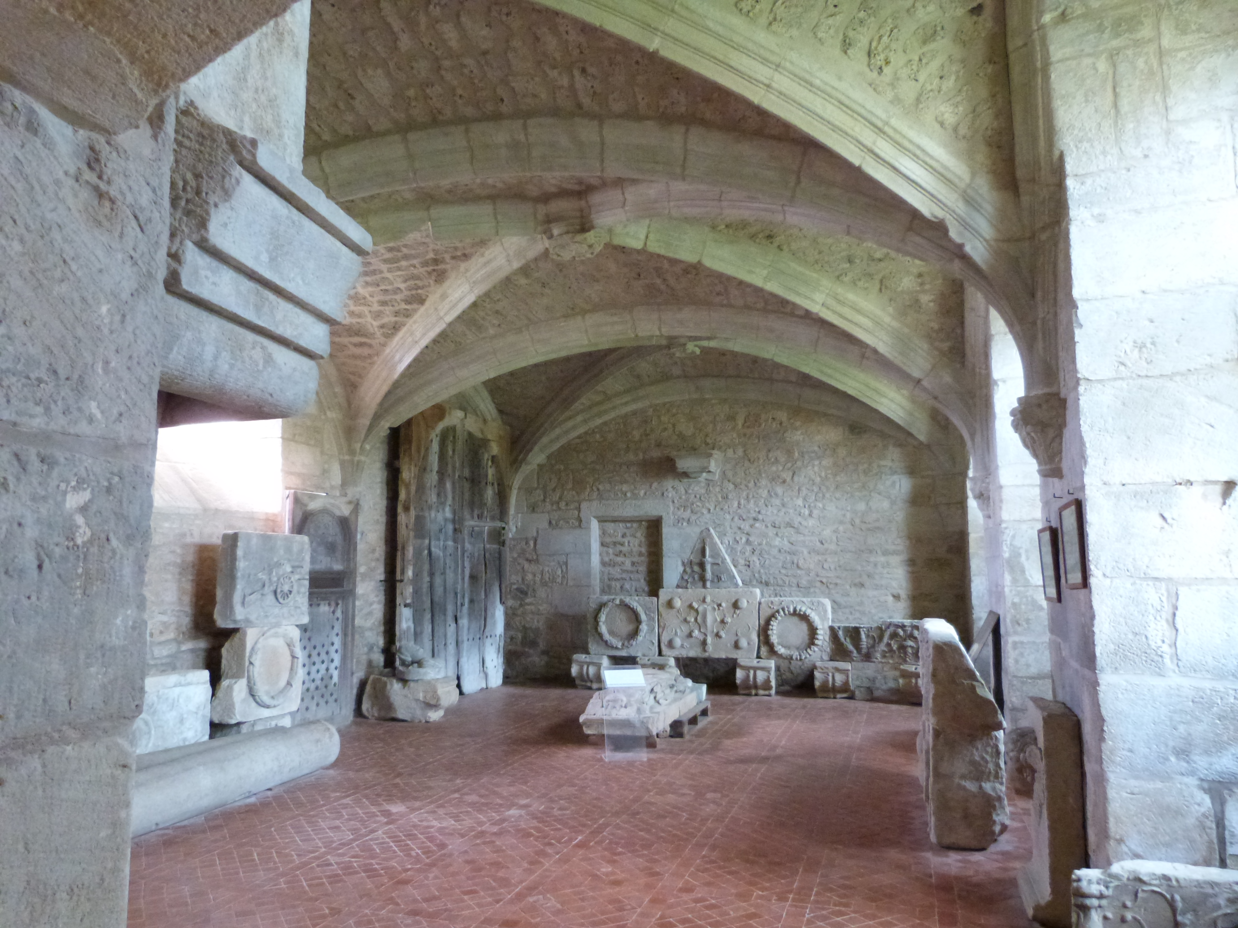 Château d'Assier (Classé) .